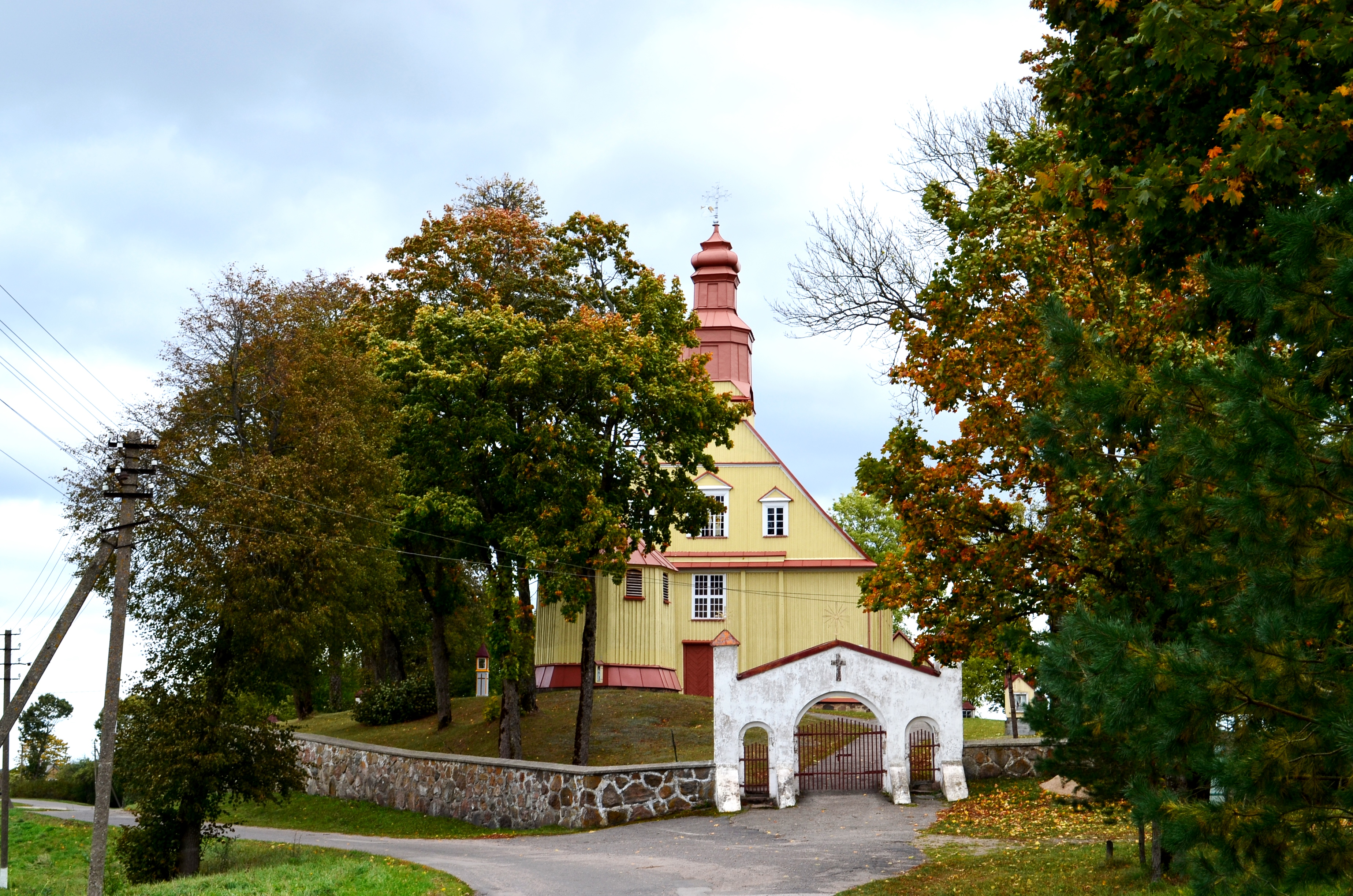 Pavandenės bažnyčia, Telšių raj.